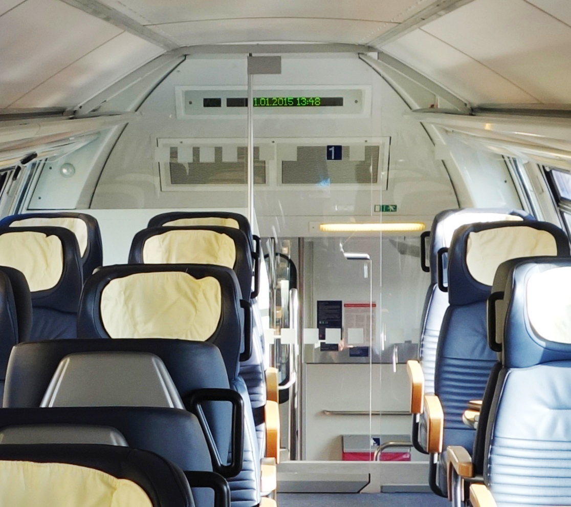 Erste-Klasse-Bereich im Obergeschoss des Doppelstockwagens DABpza D-DB 50 80 36-35 050-4 (im Einsatz auf der Bahnstrecke München-Mühldorf), mit einer einflügeligen Ganzglas-Pendeltür als Abschluss